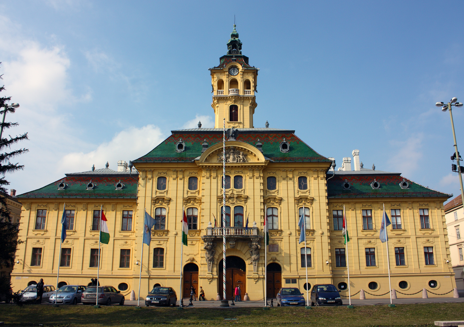 Szeged